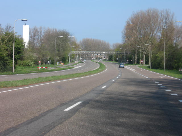 provinciale weg gezien komende vanaf Kruithuisweg